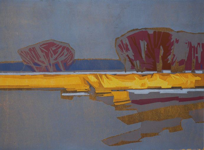 Frank Dekkers Oude Waal 2007 houtsnede 65 x 88 cm